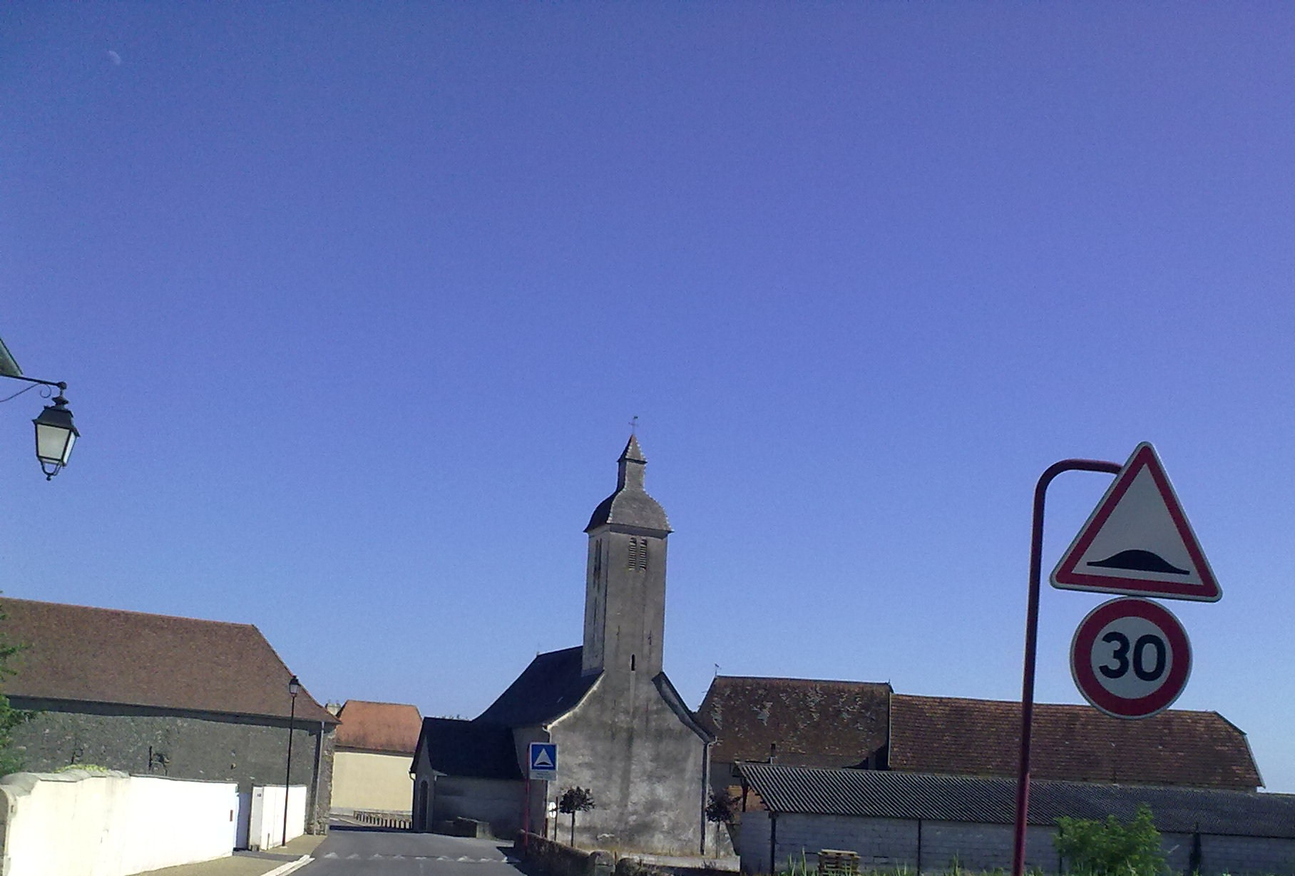 Bastanès le 18 juillet 2010, France.